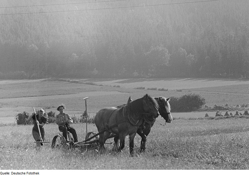 Original image description from the Deutsche FotothekPferdegespann auf einer Wiese